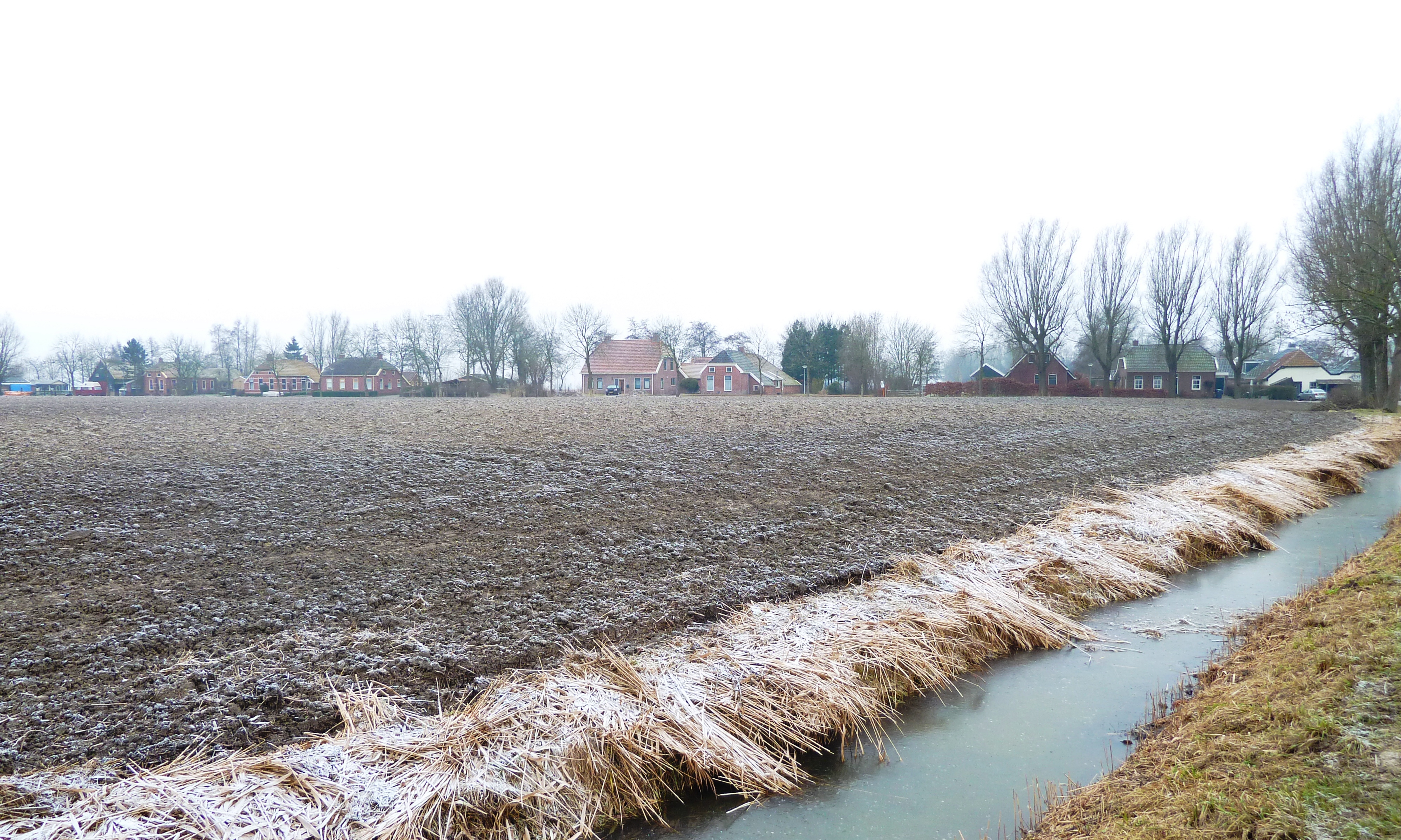 Huizen aan de Hommesweg in Oldenzijl (Eemsmond, Groningen, Nederland).